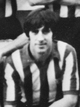 Collectie / Archief : Fotocollectie Anefo Reportage / Serie : Halve finale UEFA Cup RWD Molenbeek - Athletic de Bilbao (1977) Beschrijving : Elftalfoto Athletic de Bilbao (archief) Datum : 4 april 1977 Locatie : Bilbao, Spanje Trefwoorden : Europacup, UEFA Cup, voetbal Fotograaf : [onbekend] Auteursrechthebbende : Nationaal Archief Materiaalsoort : Negatief (zwart/wit) Nummer archiefinventaris : bekijk toegang 2.24.01.04 Bestanddeelnummer : 929-1073